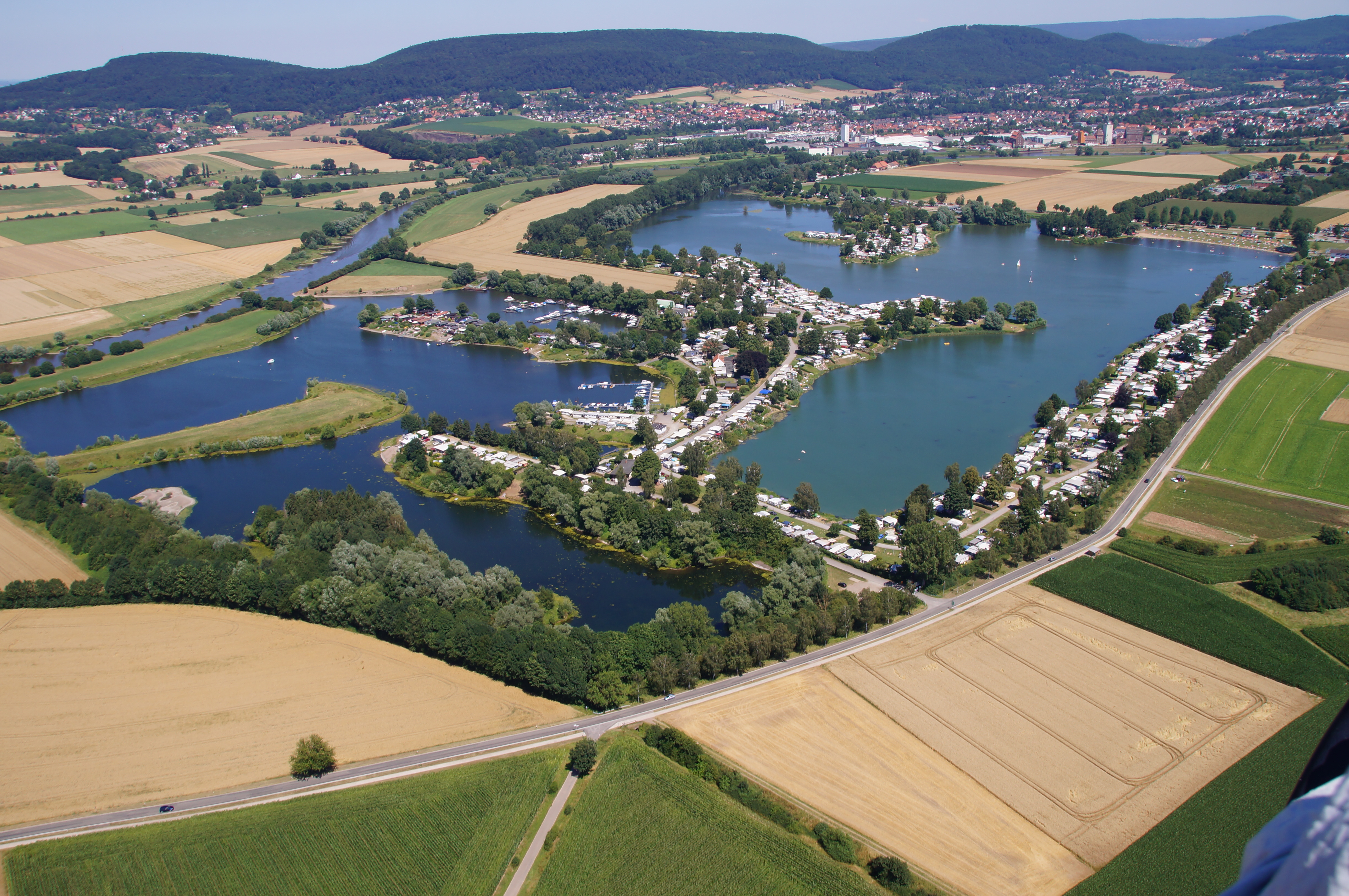 Doktorsee im Juli 2016